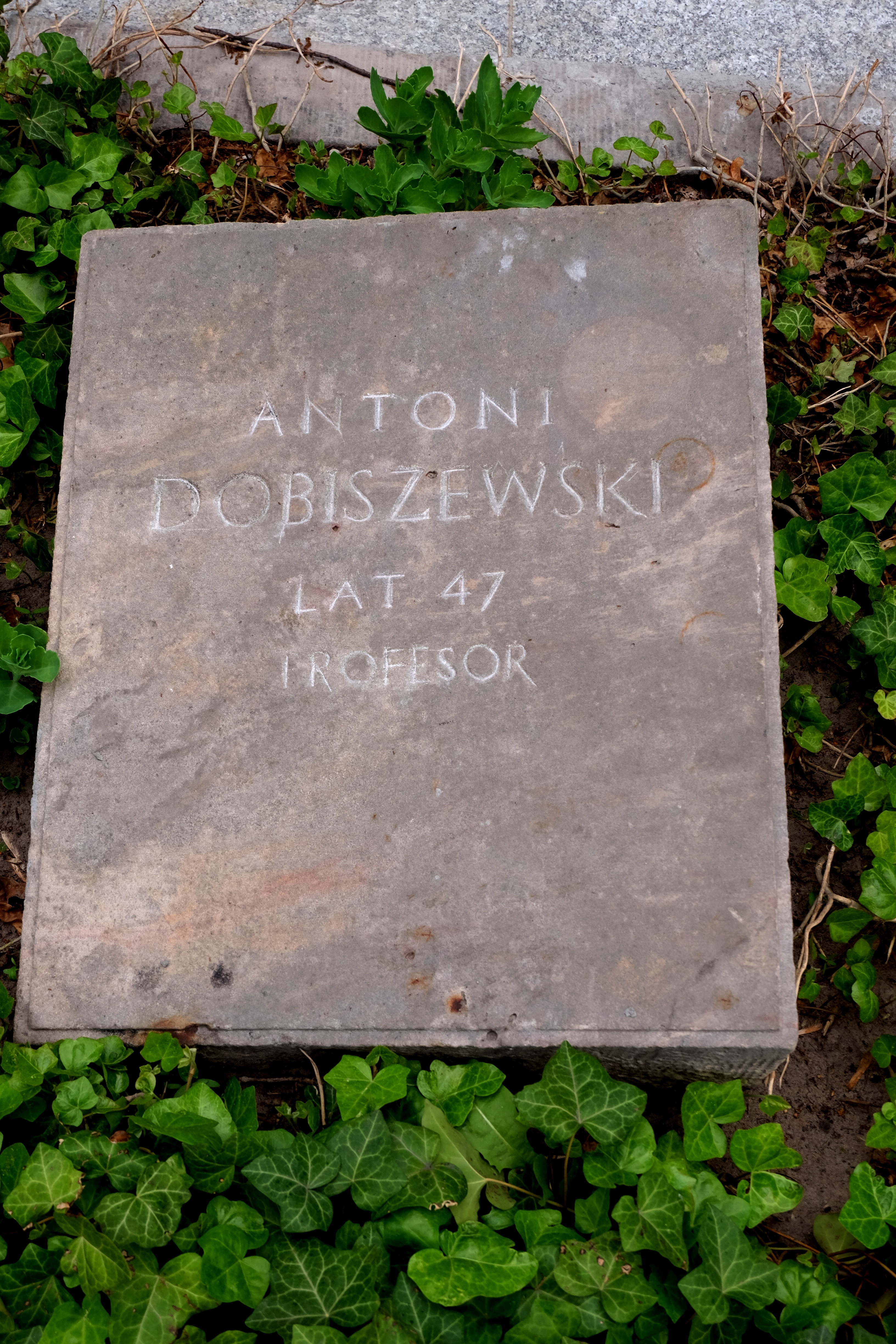 Grób działacza komunistycznego Antoniego Dobiszewskiego na Cmentarzu Wojskowym na Powązkach w Warszawie